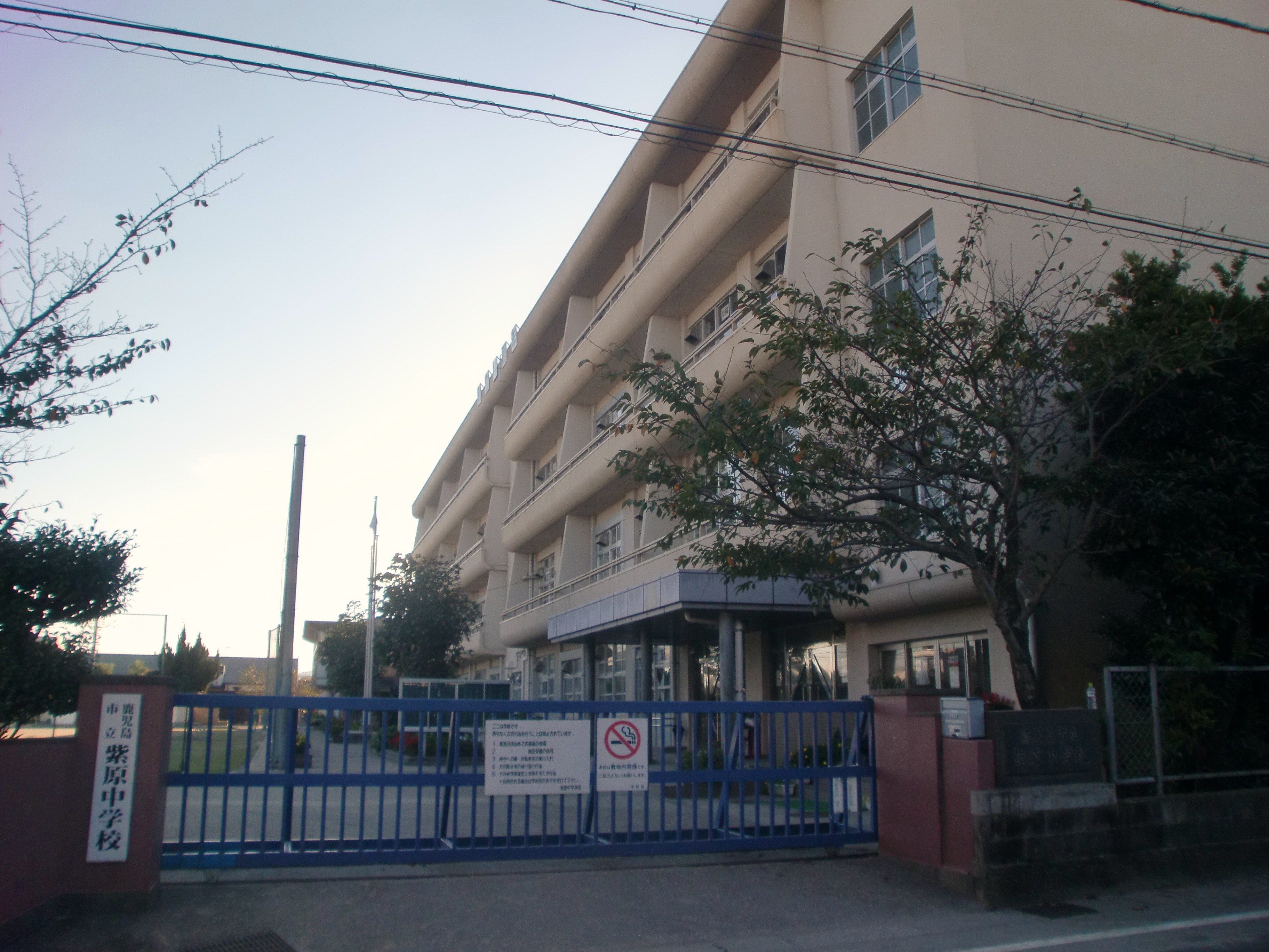 鹿児島市立紫原中学校の外観。